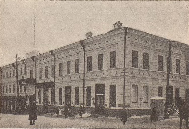 Издательство -Пермкнига- (правление)